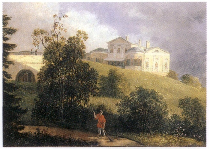 Авторство под вопросом. 1840-е. Холст, масло. 29,3 х 43. В Каталоге 1980 - неизвестный художник, картина не датирована. По стилистическим особенностям пейзаж близок к картине Волоскова 1846, изображающей вид в усадьбе Резвого Мариенгоф (каталог 387). Технологическое исследование также подтверждает авторство А. Я. Волоскова.